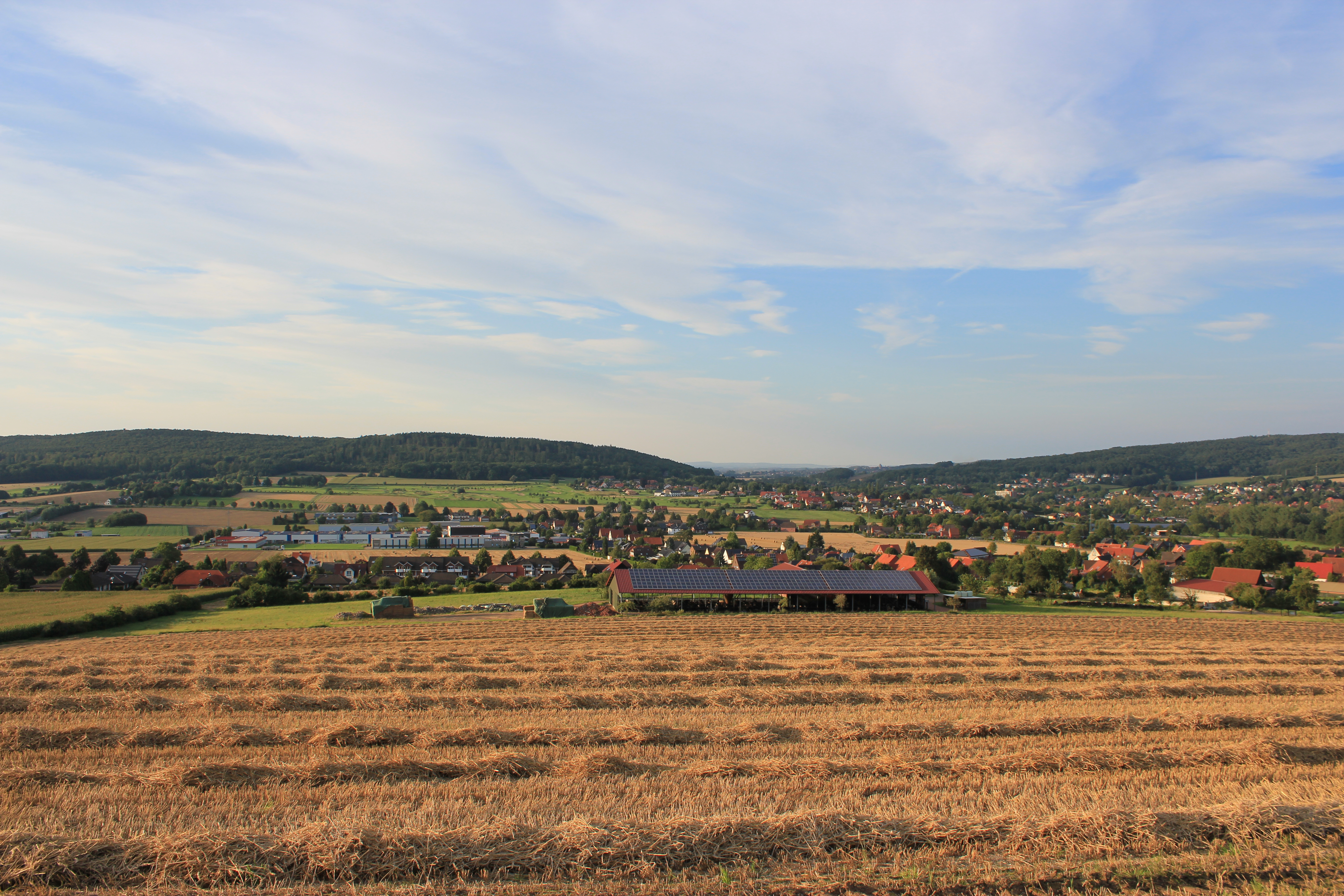 Das Bild zeigt die Gemeinde Luhden von Süden aus. Im Vordergrund sieht man Agrarflächen sowie einen landwirtschaftlichen Betrieb. Im Hintergrund lässt sich ein Teil des Gewerbegebiets, sowie der Höhenzug "Harrl" ausmachen.